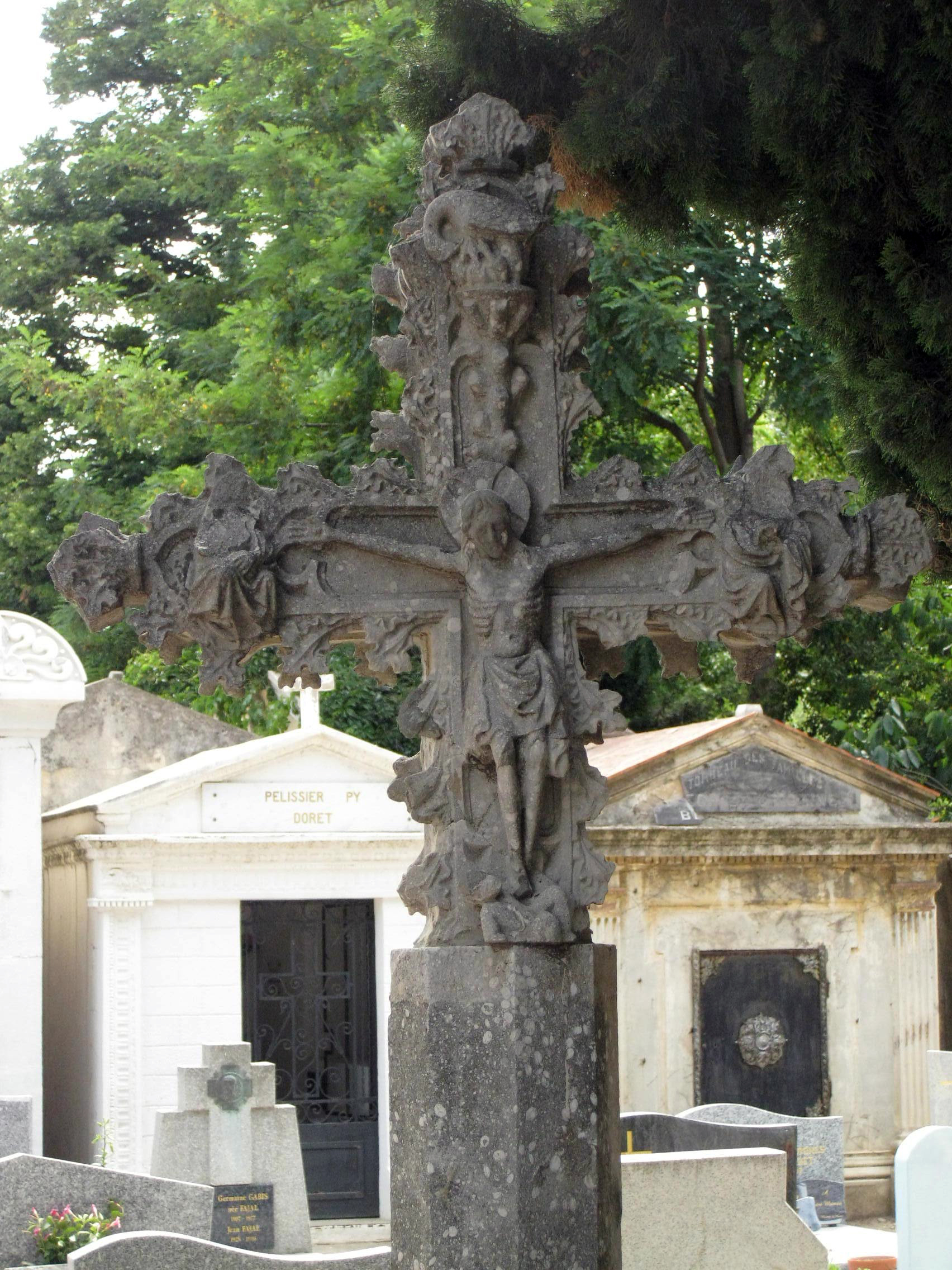 Creu del cementiri (Cotlliure)